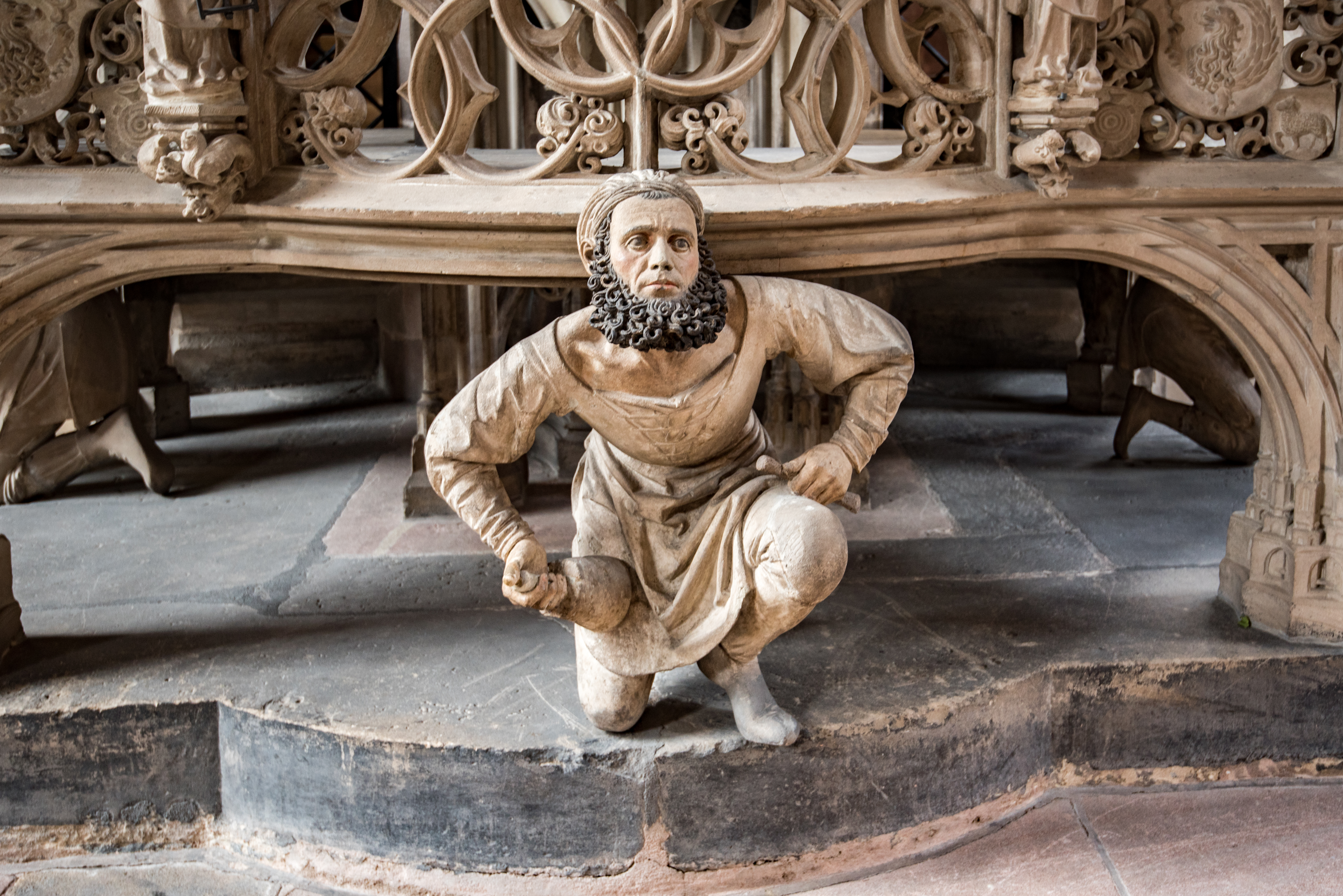 Nürnberg, St. Lorenz, Sakrementshaus von Adam Kraft